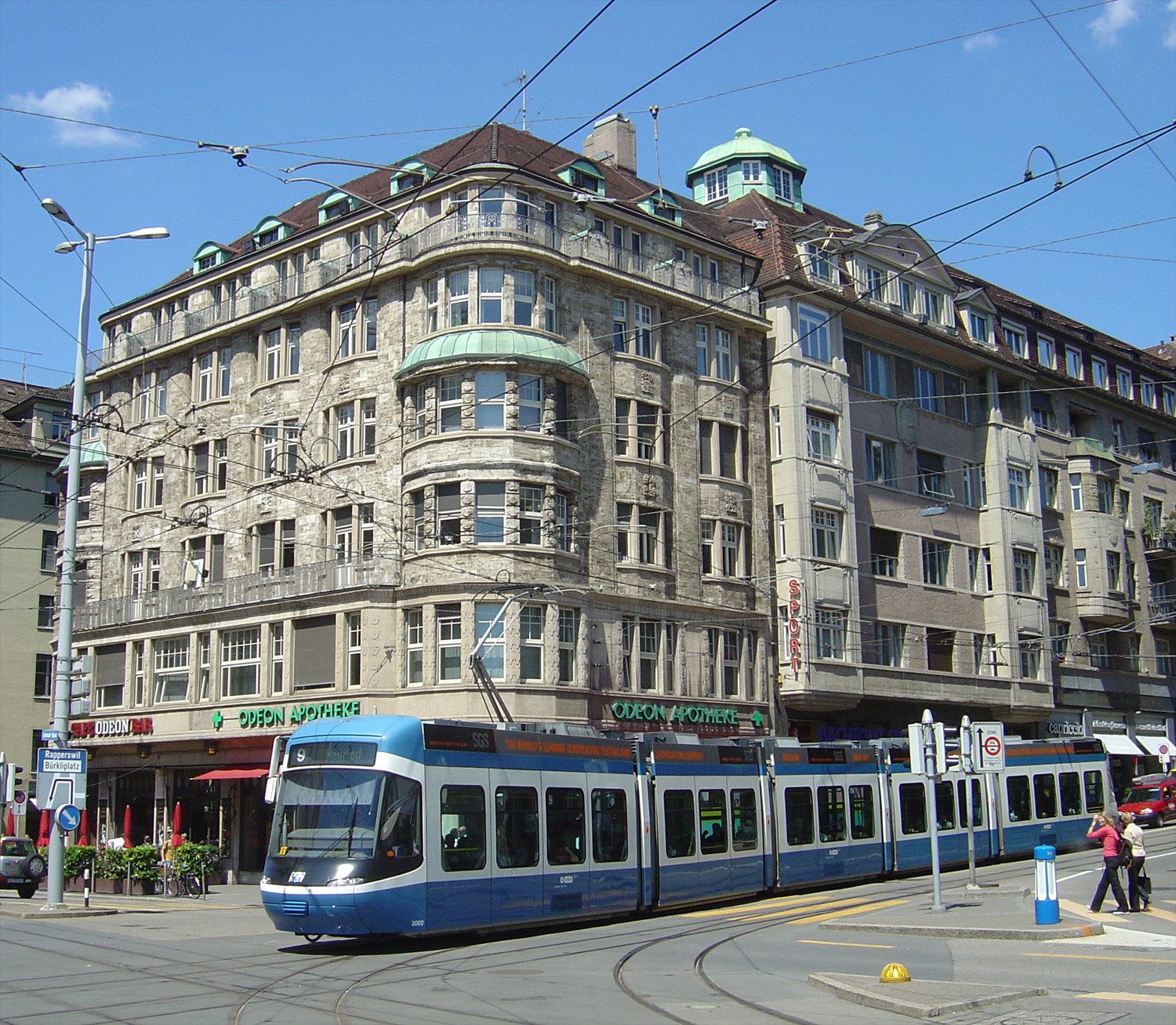 Das Cobratram am Bellvue vor dem Odeon